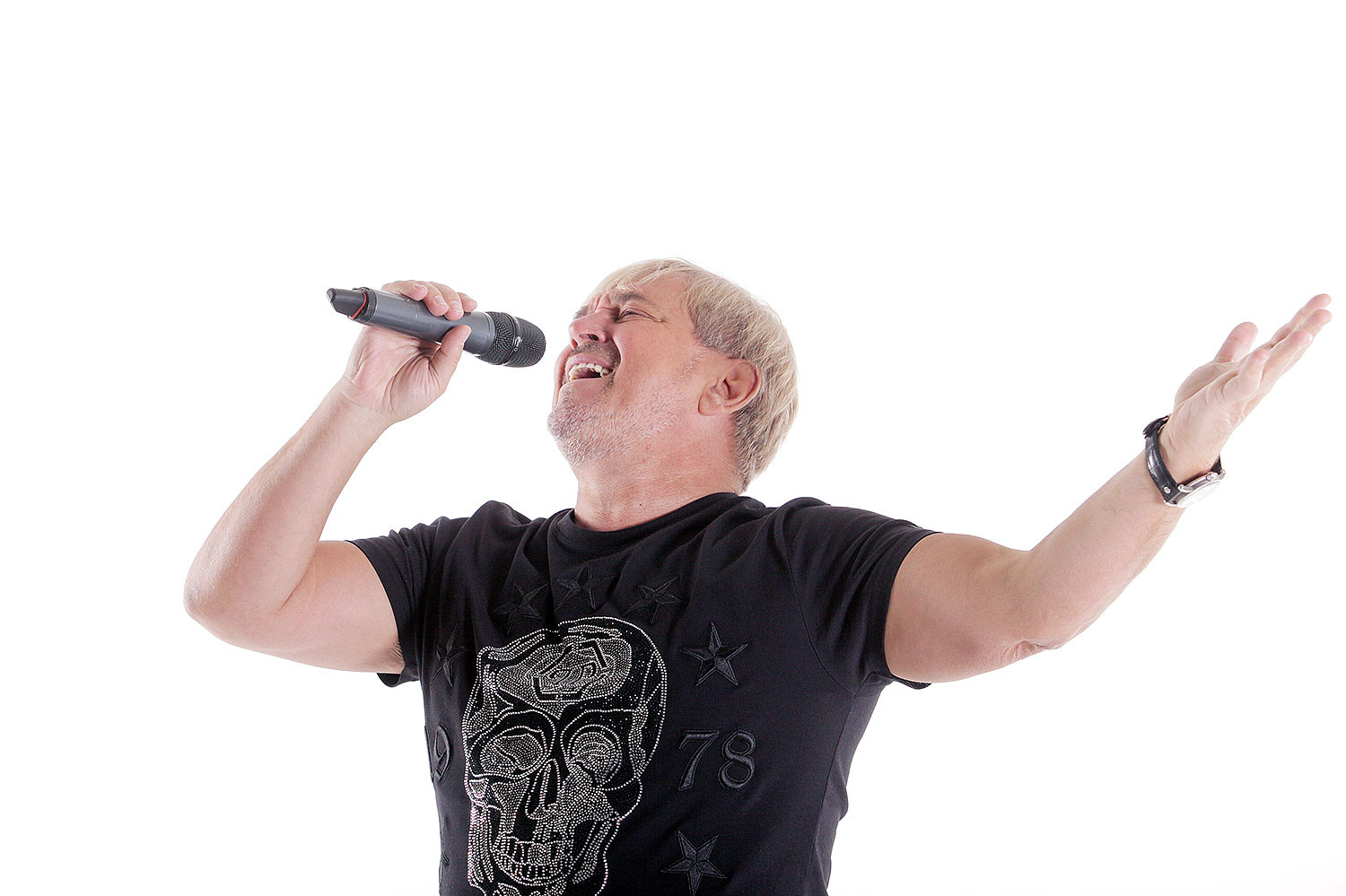 Михайло Грицкан